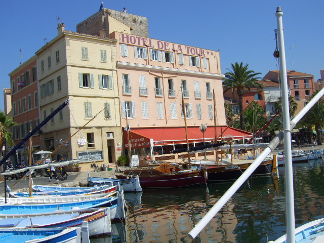 Der Tour "romane", Hotel de la Tour